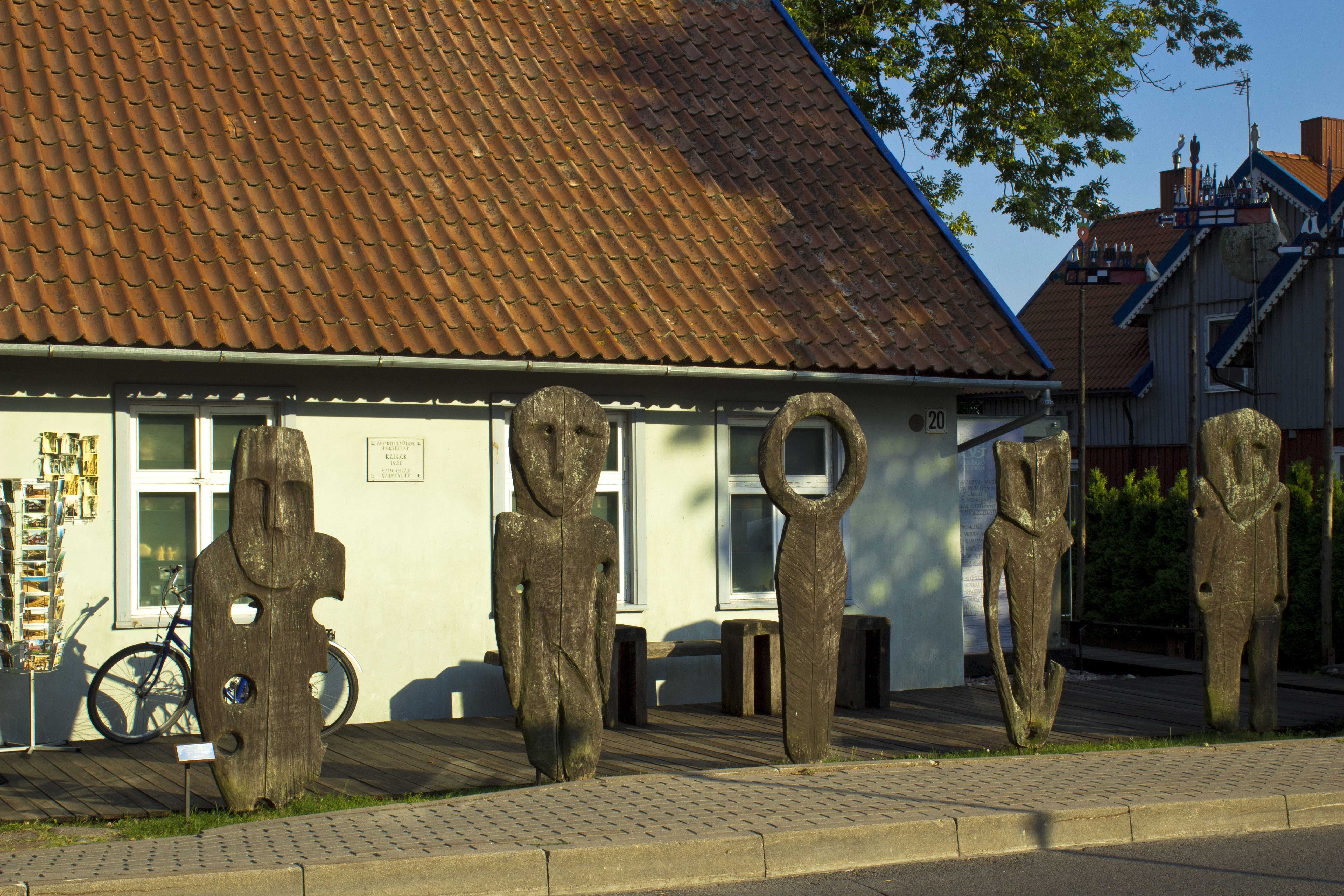 Nida